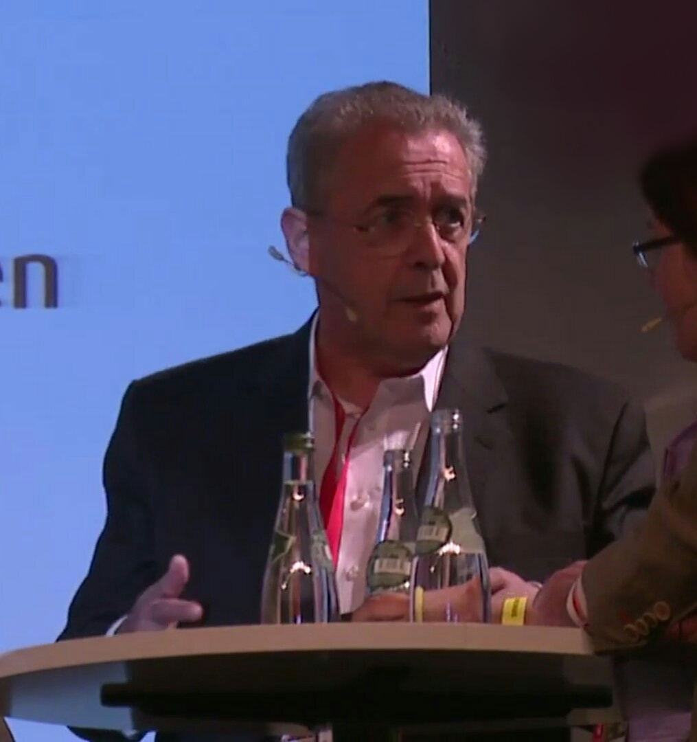 Find out more at: Wenn's ums Geld geht, sind wir Hedonisten. Wir geben es gerne aus für die schönen Dinge des Lebens, für alles, was Spaß macht. Wir wissen aber auch: Eigentlich müssten wir uns nicht nur mit dem Ausgeben beschäftigen, sondern auch mit der Geldanlage. Aber wer setzt sich schon gerne mit trockenen Finanzthemen auseinander? In der Session wollen wir über unsere komplizierte Beziehung zum Geld diskutieren. Ulrich Hegge Thomas Knüwer Joachim Goldberg Annabel Oelmann Hannah Wilhelm Creative Commons Attribution-ShareAlike 3.0 Germany (CC BY-SA 3.0 DE)